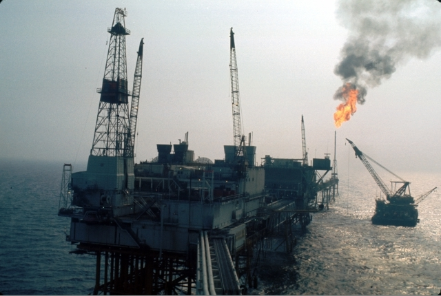 Fra Ekofisk-feltet